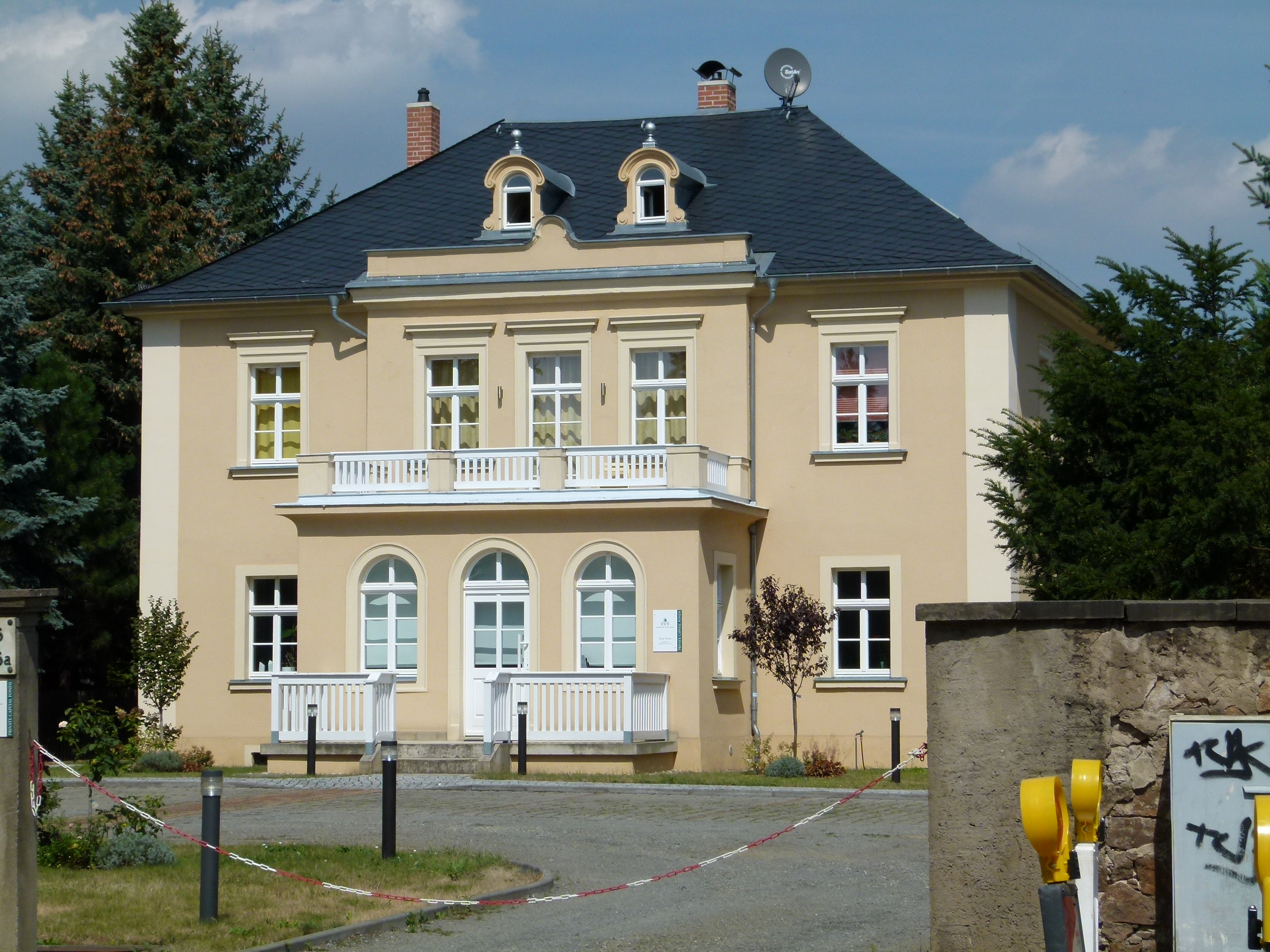 Denkmalgeschütztes Haus, Meißner Straße 226, Radebeul, Sachsen